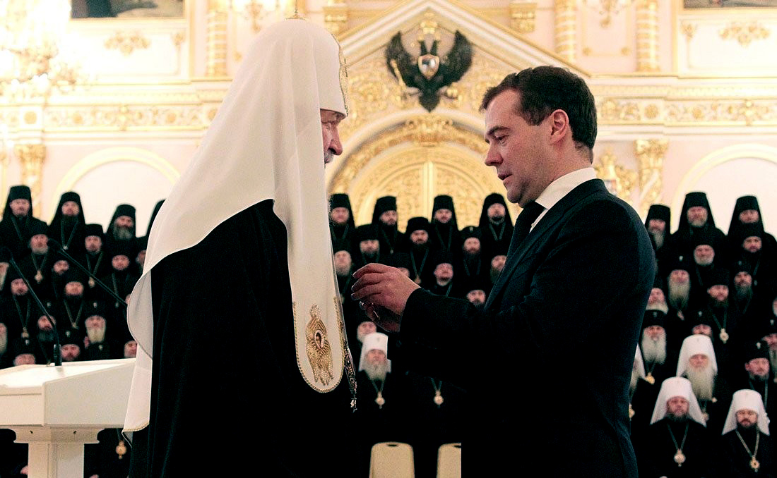 Дмитрий Медведев вручил Патриарху Московскому и всея Руси Кириллу орден Александра Невского.